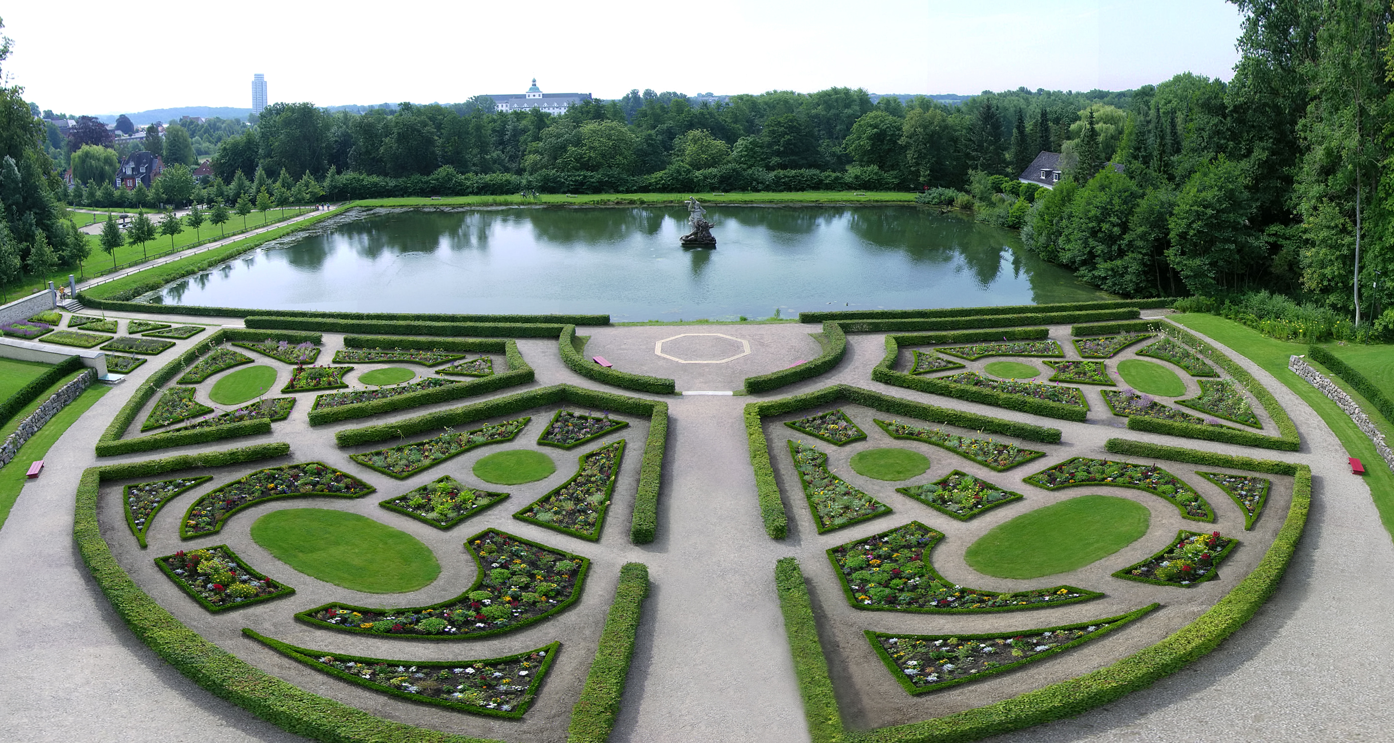 Neuwerkgarten looking south